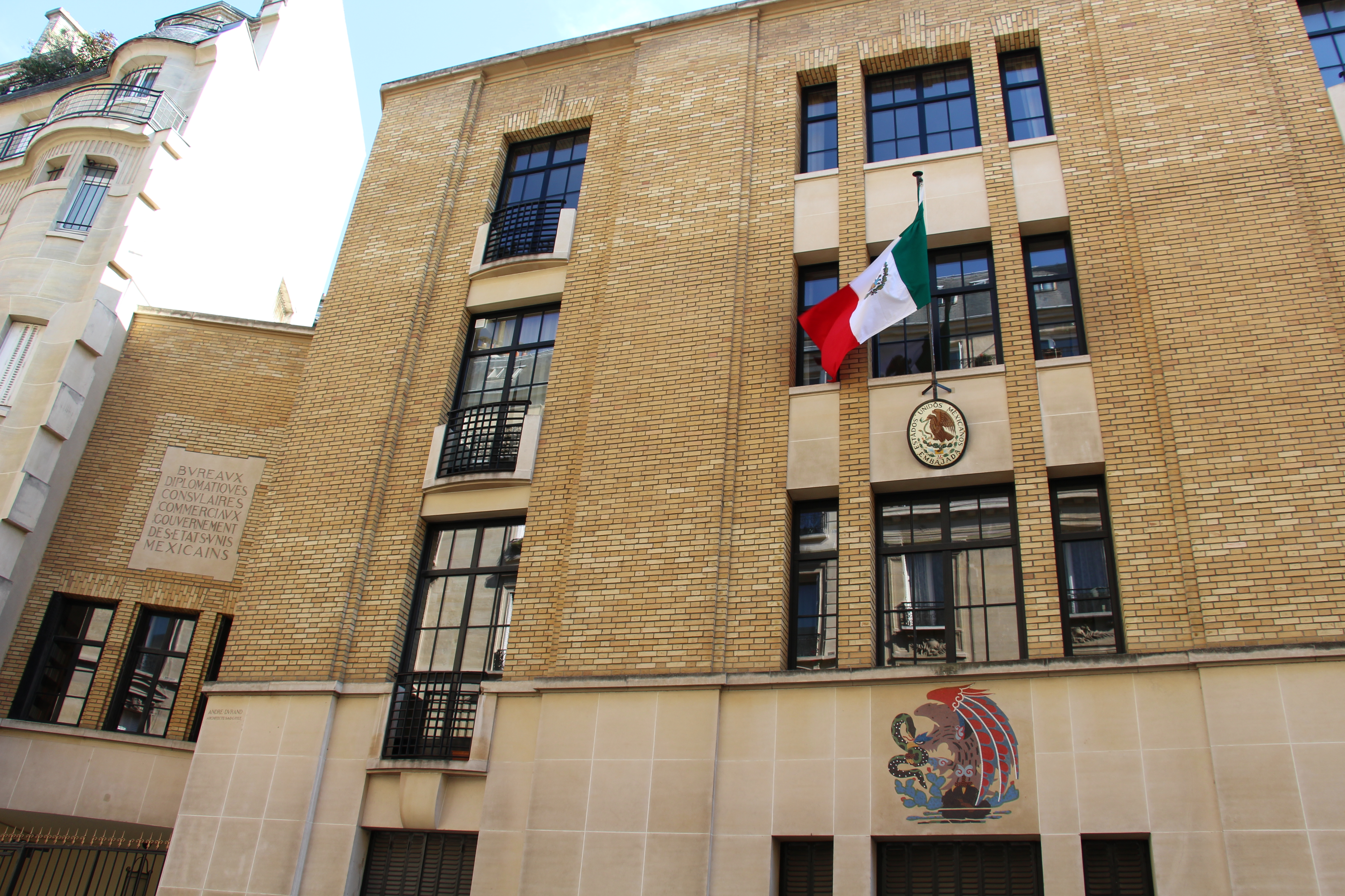 (Chaillot) Avenue du Président-Wilson/Rue de Longchamp Mexican embassy. Arch. André Durand and muralist painter Angel Zárraga 1926-27. View of the Rue de Longchamp façade.